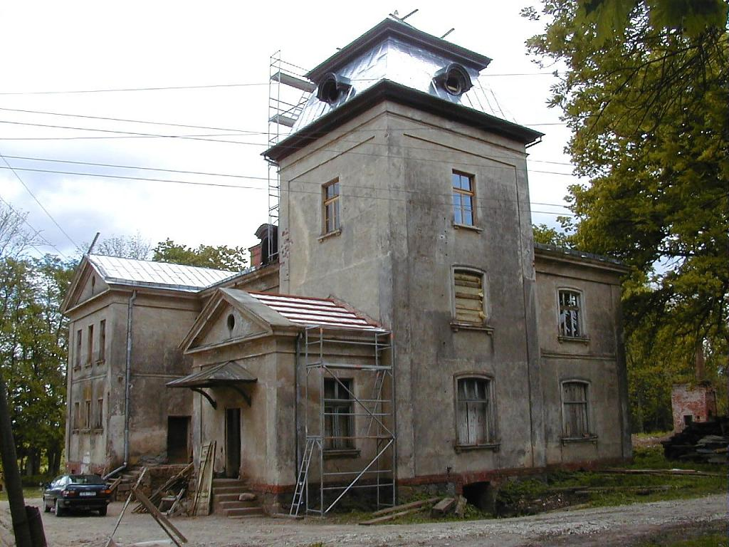 Veismaņu muižas pils 2001-05-26